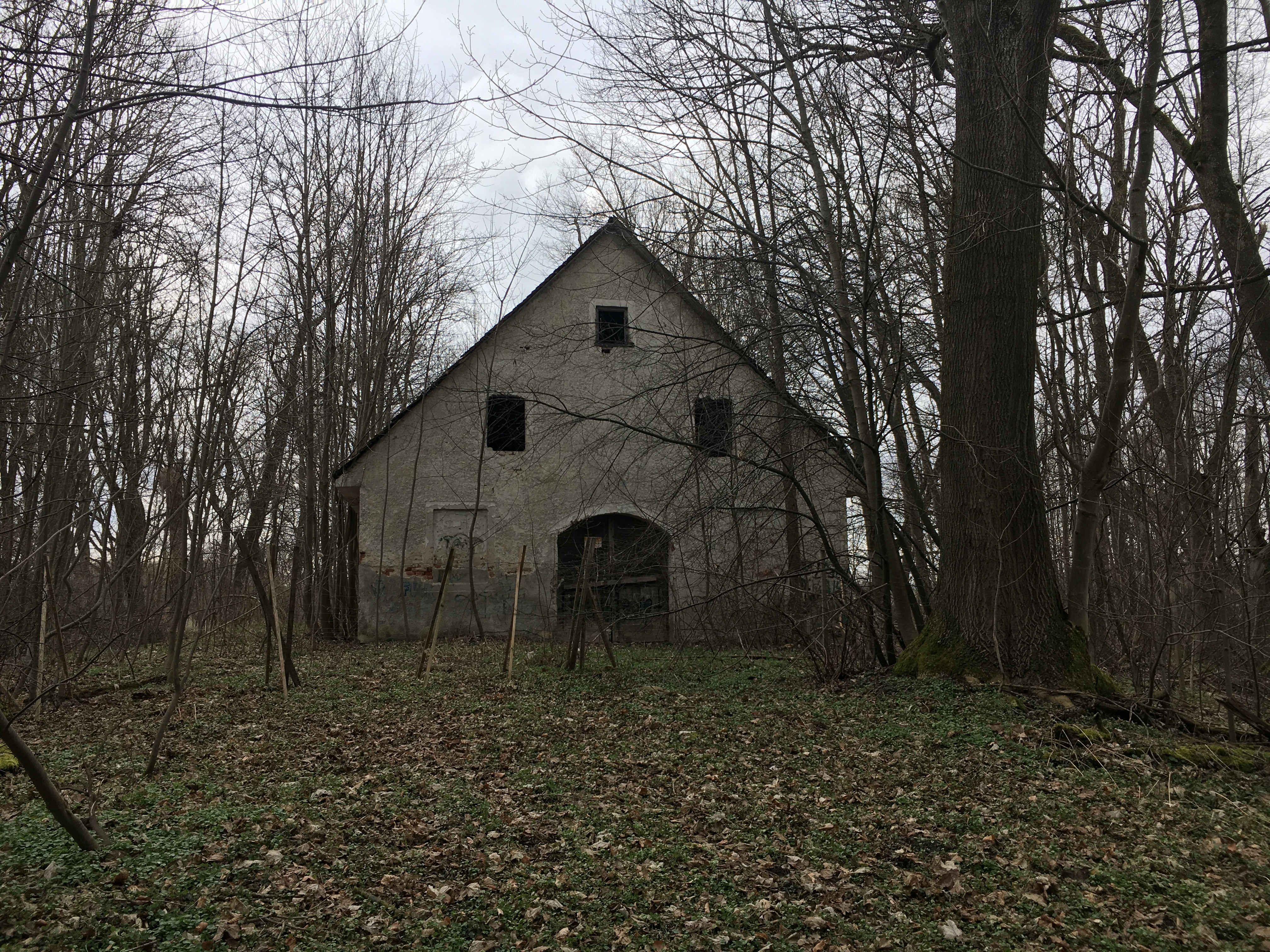 Zu sehen sind Überreste der Brauerei des Schlosses Weyhern in der oberbayerischen Gemeinde Egenhofen. Das Gebäude wird seit vielen Jahren nicht mehr genutzt und befindet sich in einem sehr schlechten Zustand. Das Haus wurde vor einigen Jahrzehnten von einem umgestürzten Baum zertrennt. Das gesamte Anwesen ist untertunnelt und unterkellert. Das Mobiliar ist nicht mehr vorhanden. Die Ruine befindet sich in einem kleinen Waldstück zwischen Egenburg, Egenhofen und Weyhern. Das Haus entstand vermutlich im 18. oder 19. Jahrhundert. Es handelt sich um einen zweigeschossigen Putzbau mit Satteldach und Gauben. D-1-79-117-16